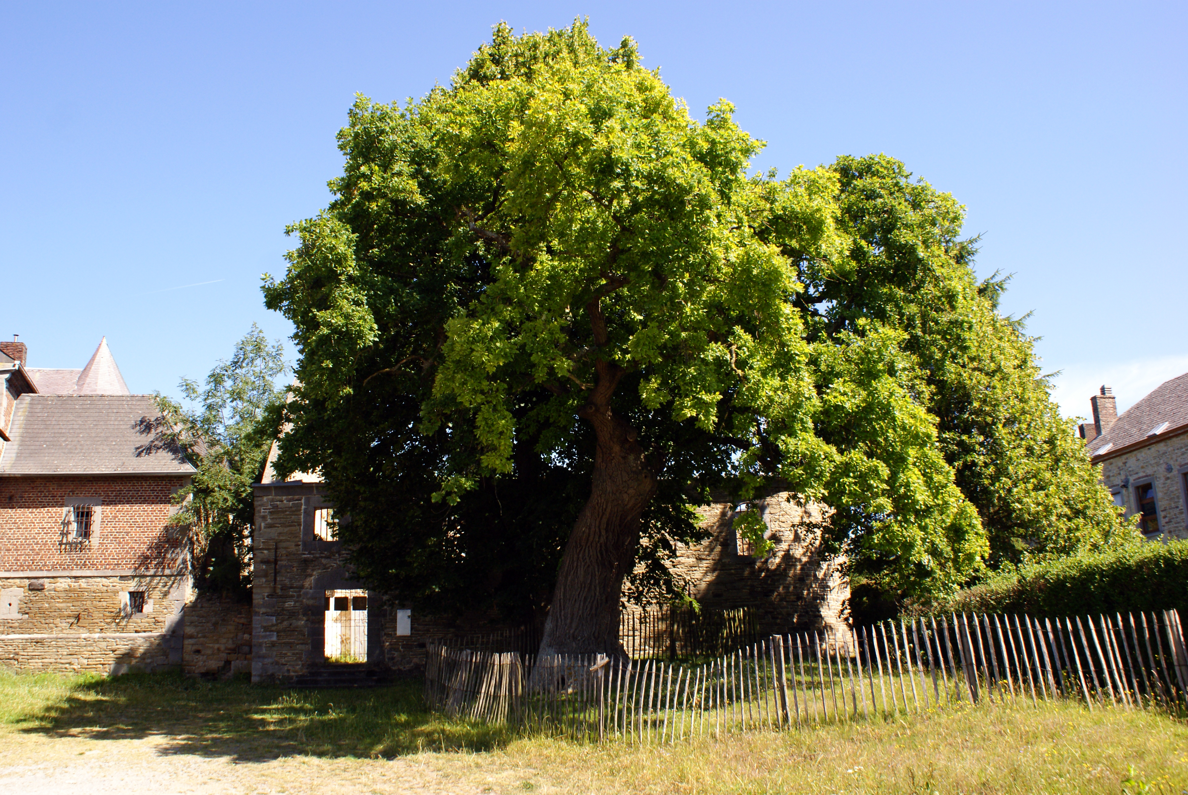 Chateau-ferme de Wartet, arbre remarquable (tilleul) devant la chapelle Sainte-Apolline, Bayet